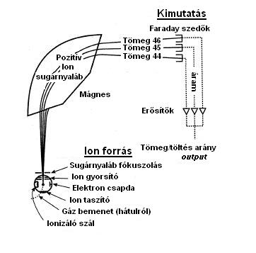 Ez az angol Wikimedia Commons Mass spectrometer schematic ábra magyar változata